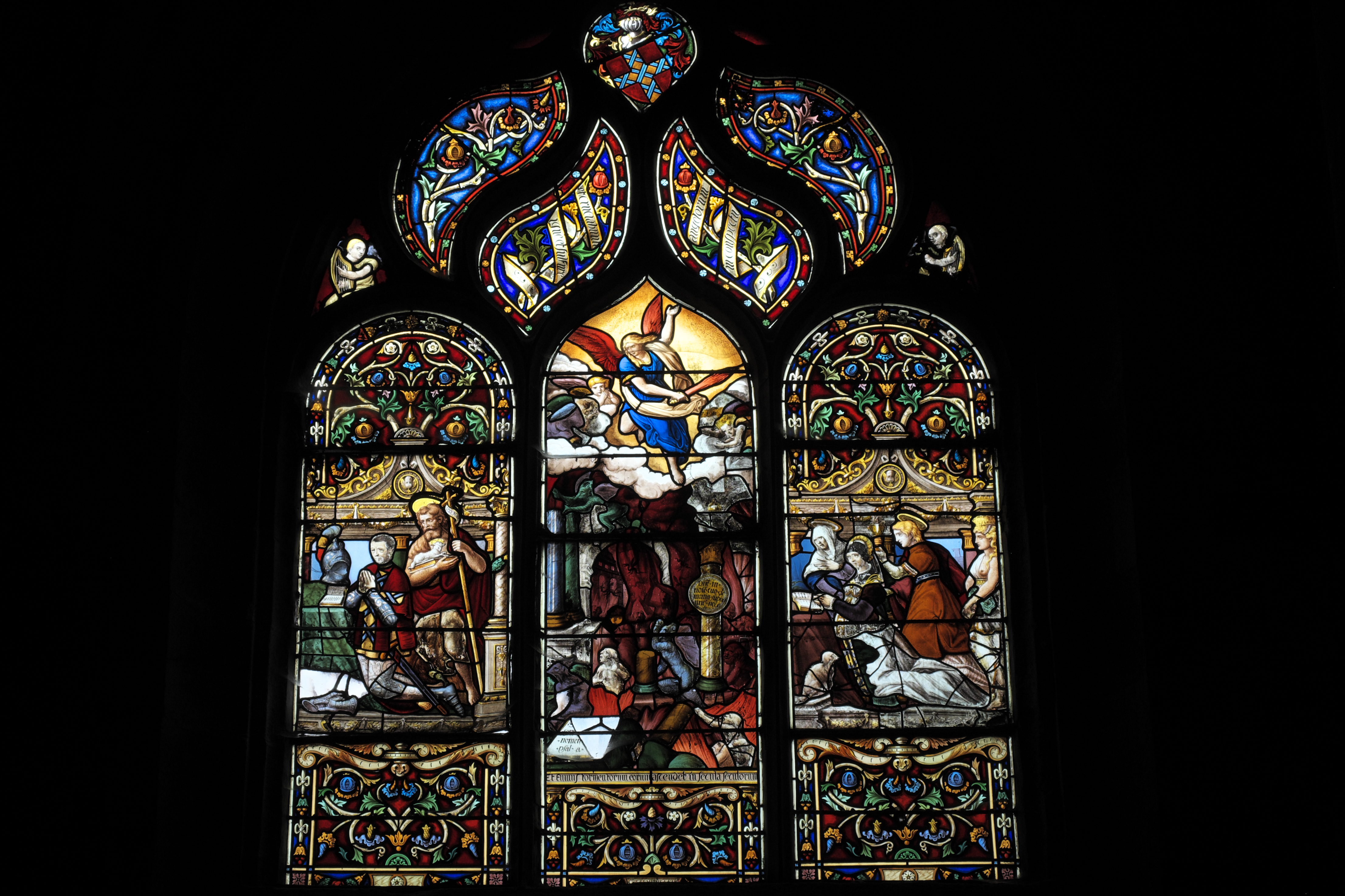 Ehemalige Kathedrale Saint-Paul-Aurélien in Saint-Pol-de-Léon im Département Finistère (Region Bretagne/Frankreich), Bleiglasfenster